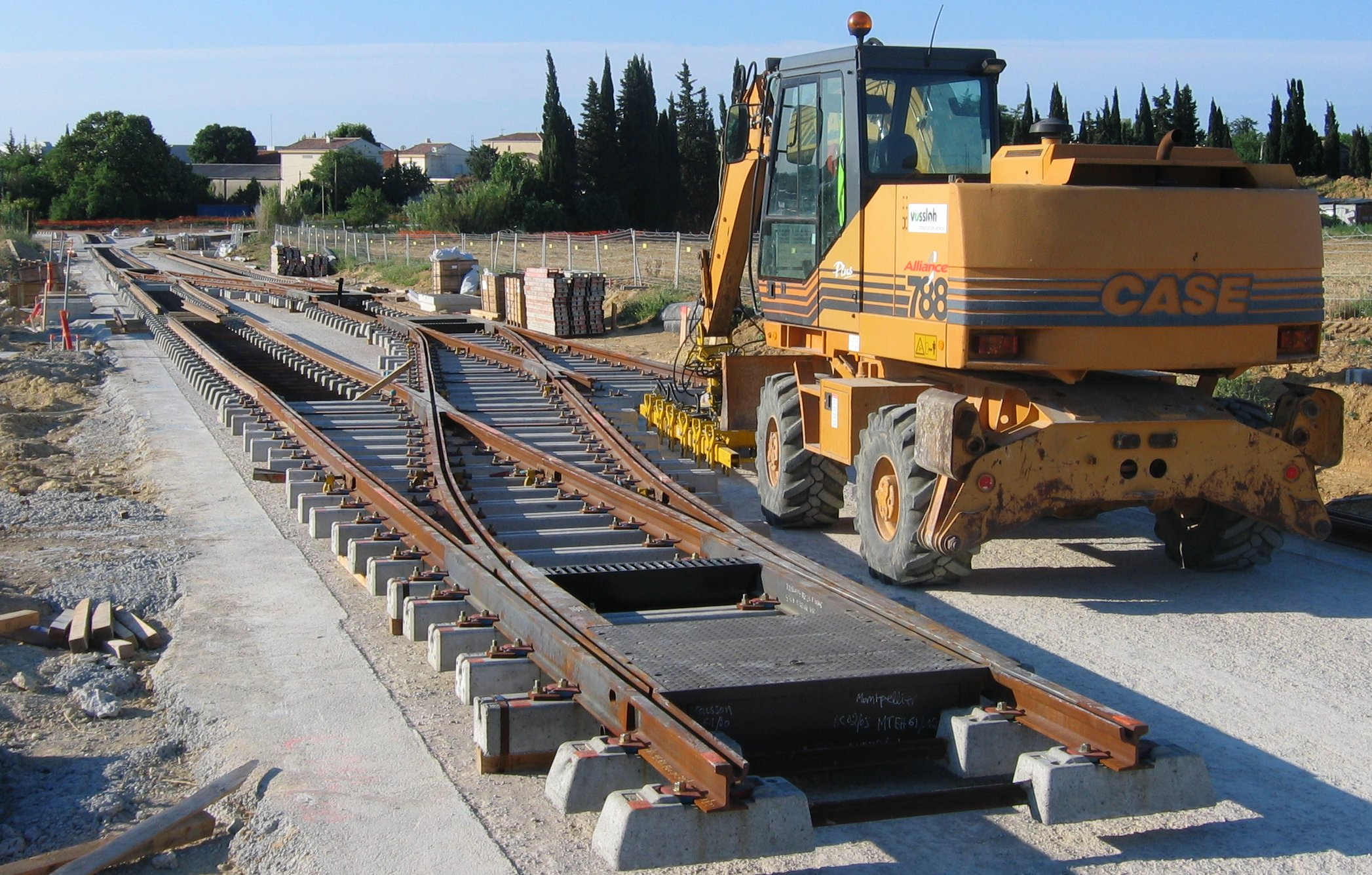 Travaux de la deuxième ligne de Montpellier au passage du futur quartier des Grisettes : pose des rails, aiguillage de l'arrêt Sabines, engin de levage.